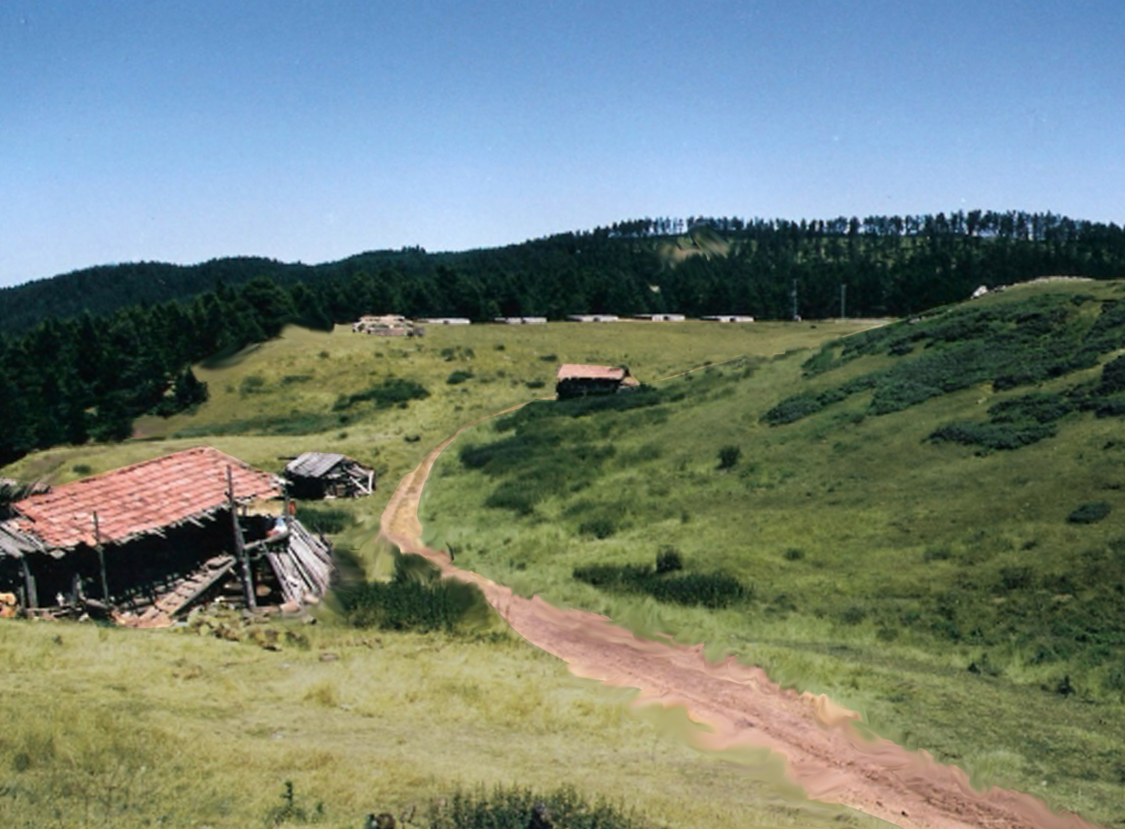 Gölet köyünden akkayaya çıkış.Yılmaz karagöl